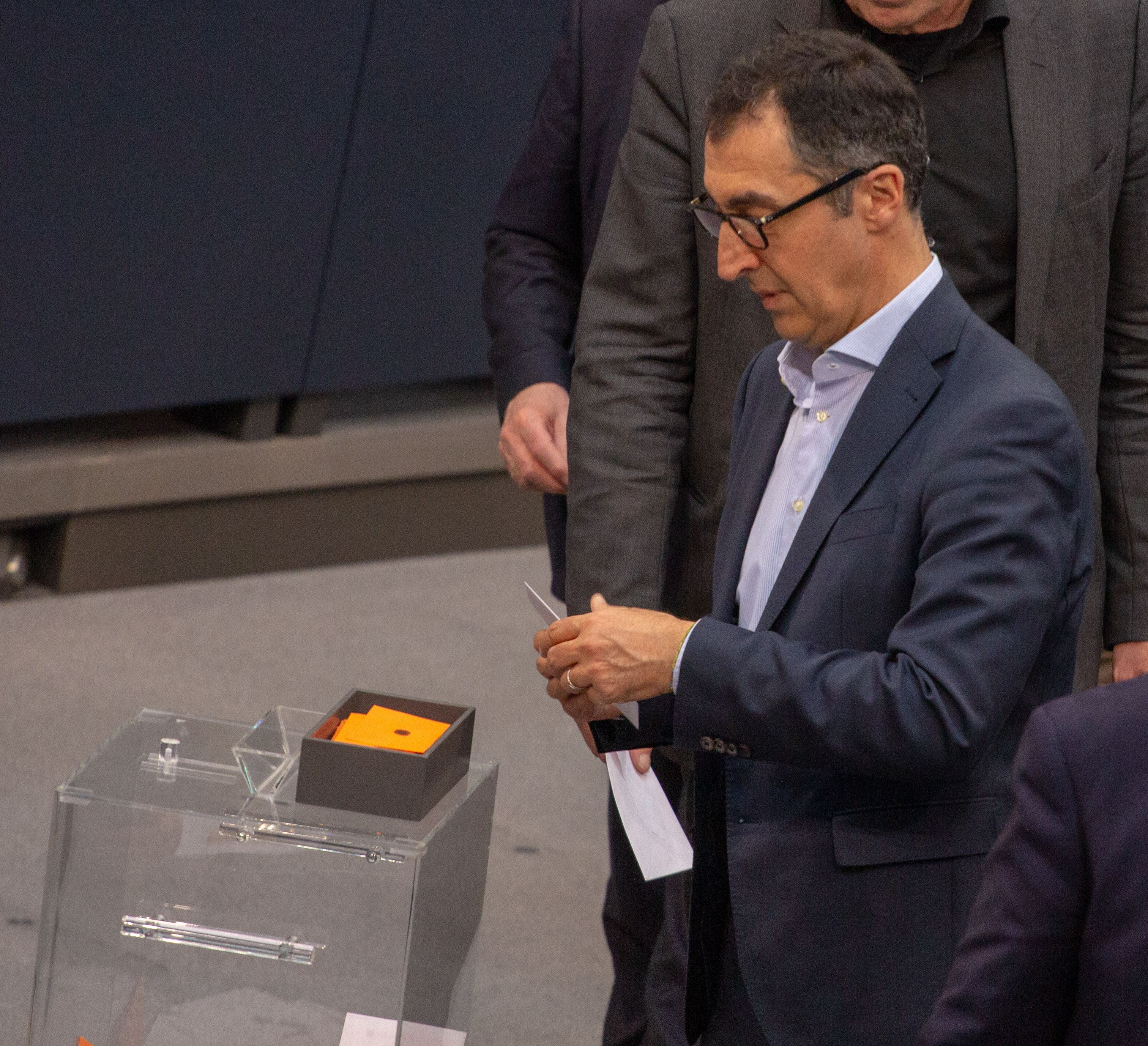 Cem Özdemir, Mitglied des Deutschen Bundestages, während einer Plenarsitzung am 11. April 2019 in Berlin.